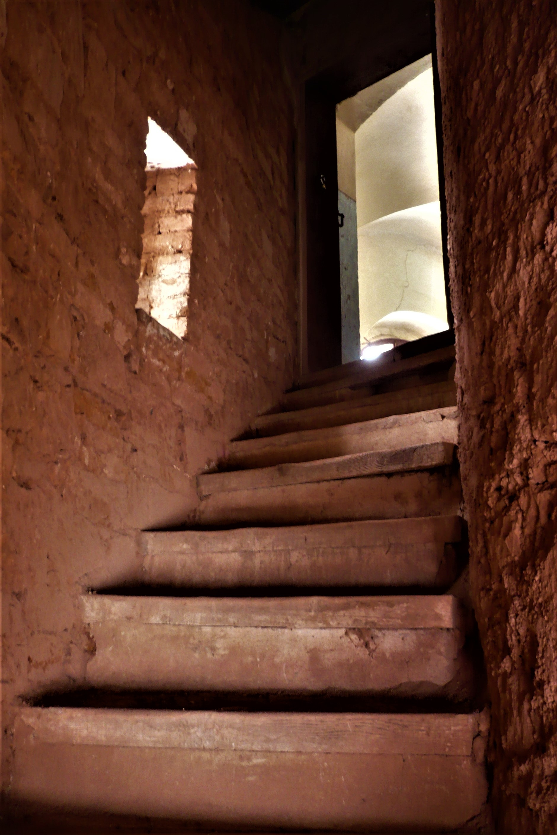 Schody na chór